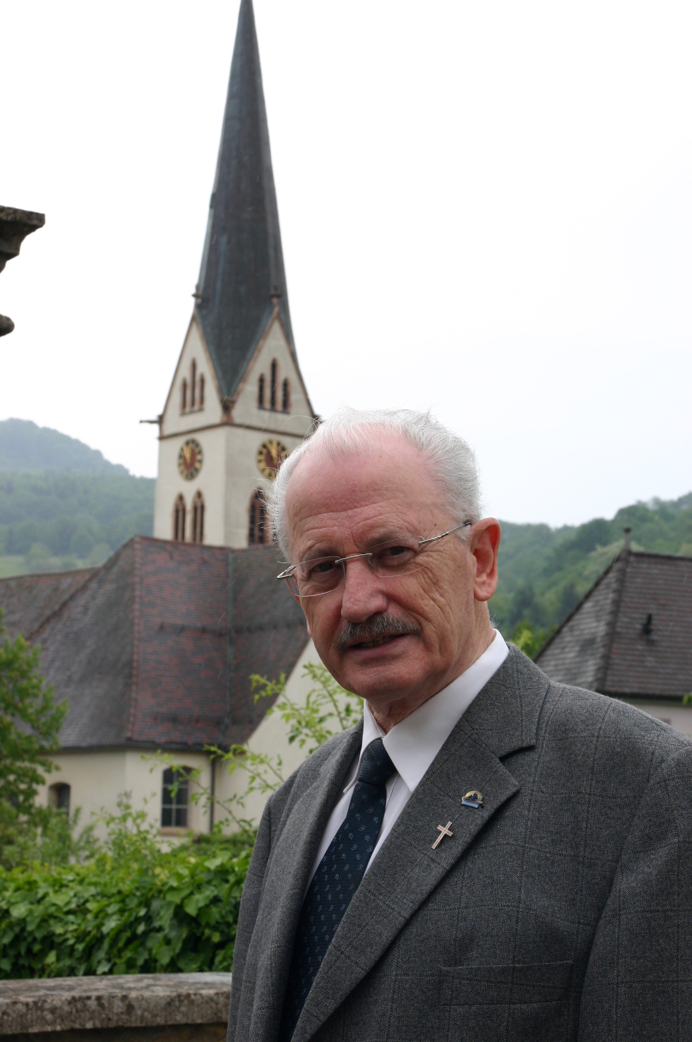 Photo des Pfarrers und Kunsthistorikers Manfred Hermann